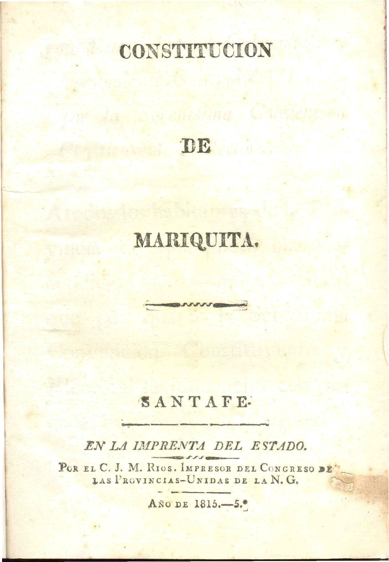 Constitución del Estado Libre de Mariquita de 1815